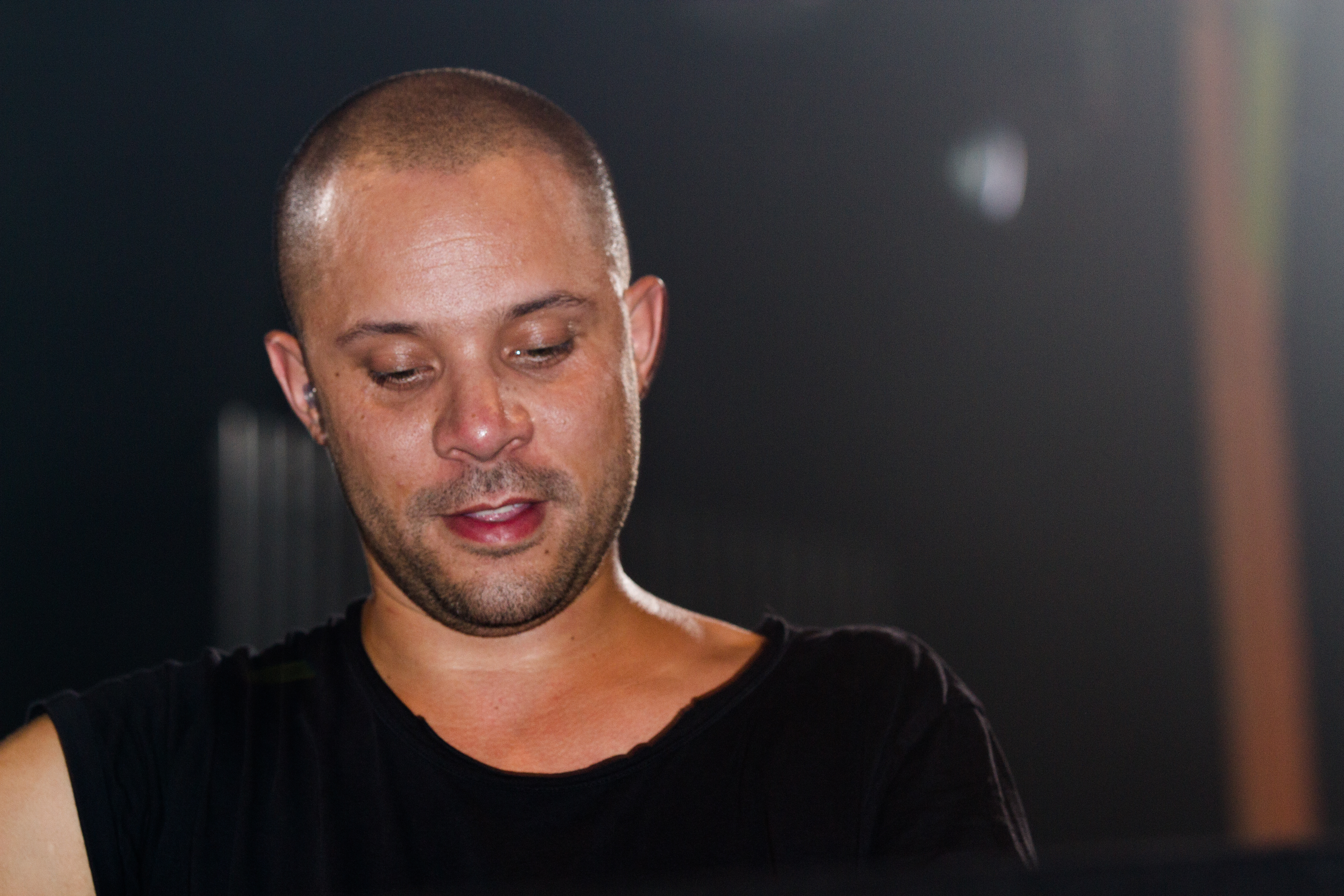 Wildstylez (Joram Metekohy) beim 14. Airbeat-One Dance Festivals das vom 16. bis 19. Juli 2015 auf dem Flugplatz Neustadt-Glewe stattfand.